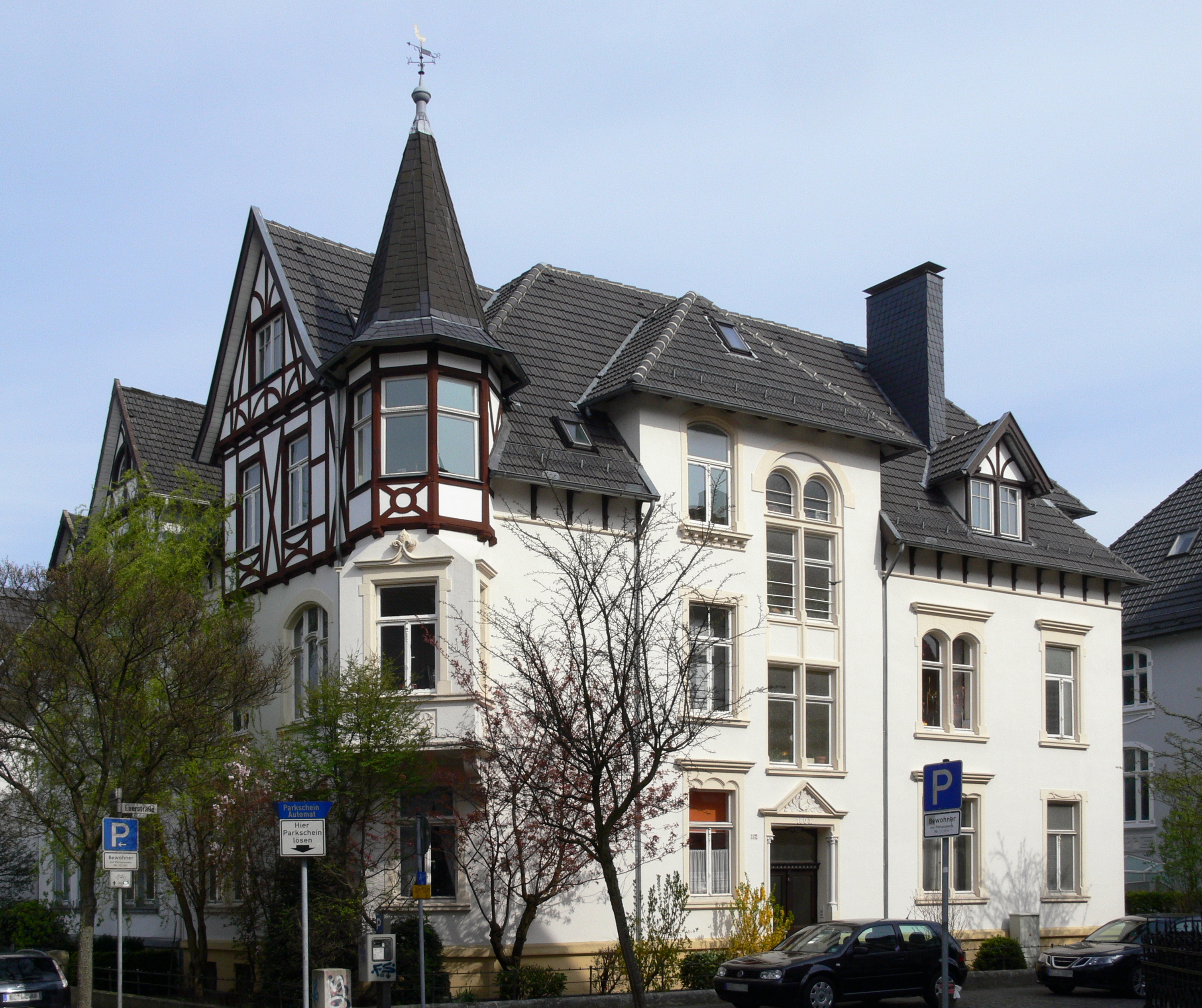 Baudenkmal in Bielefeld, Laerstr. 12; Villa (Baudenkmalnummer 250)